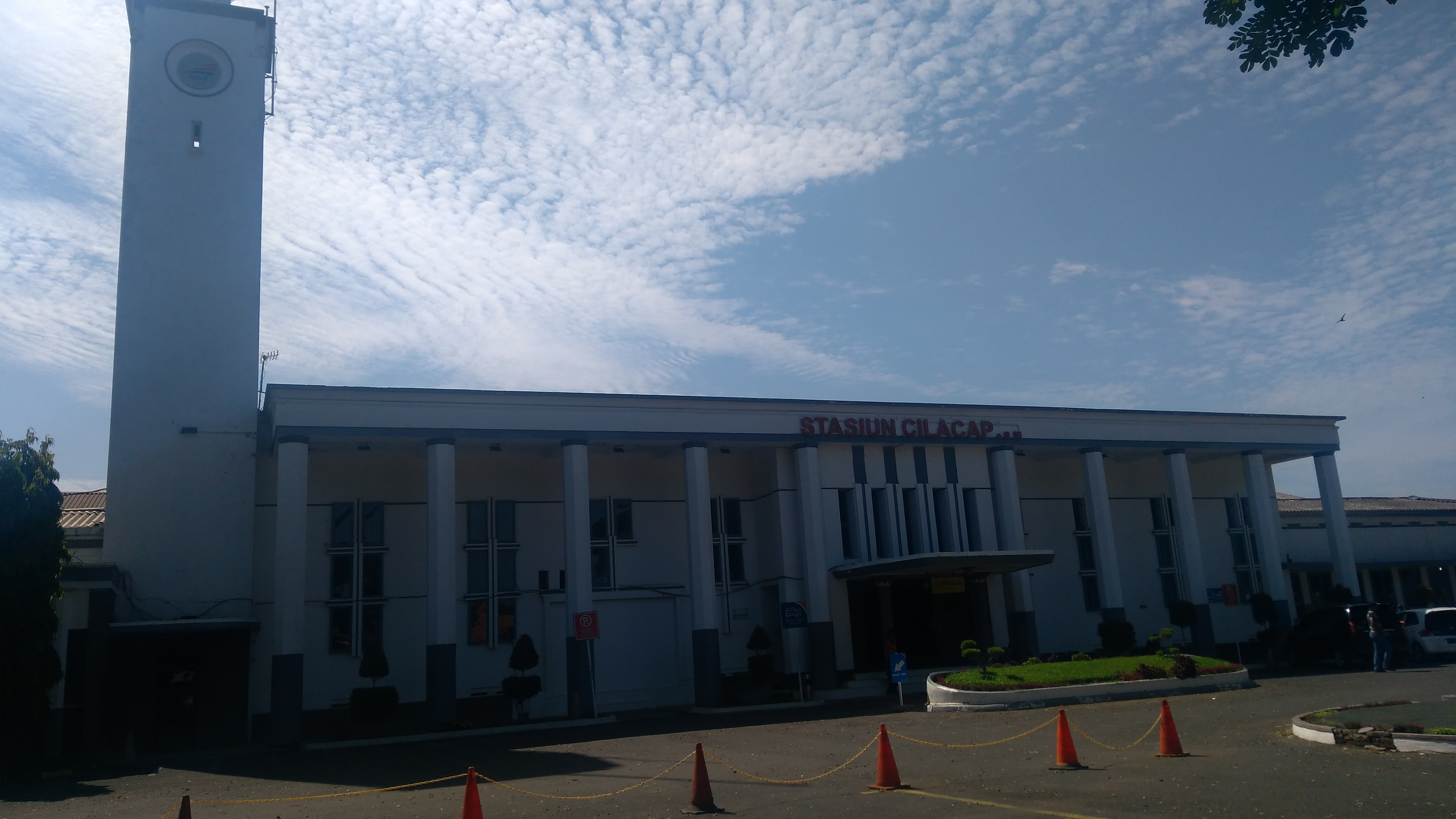 Bangunan utama dari Stasiun Cilacap